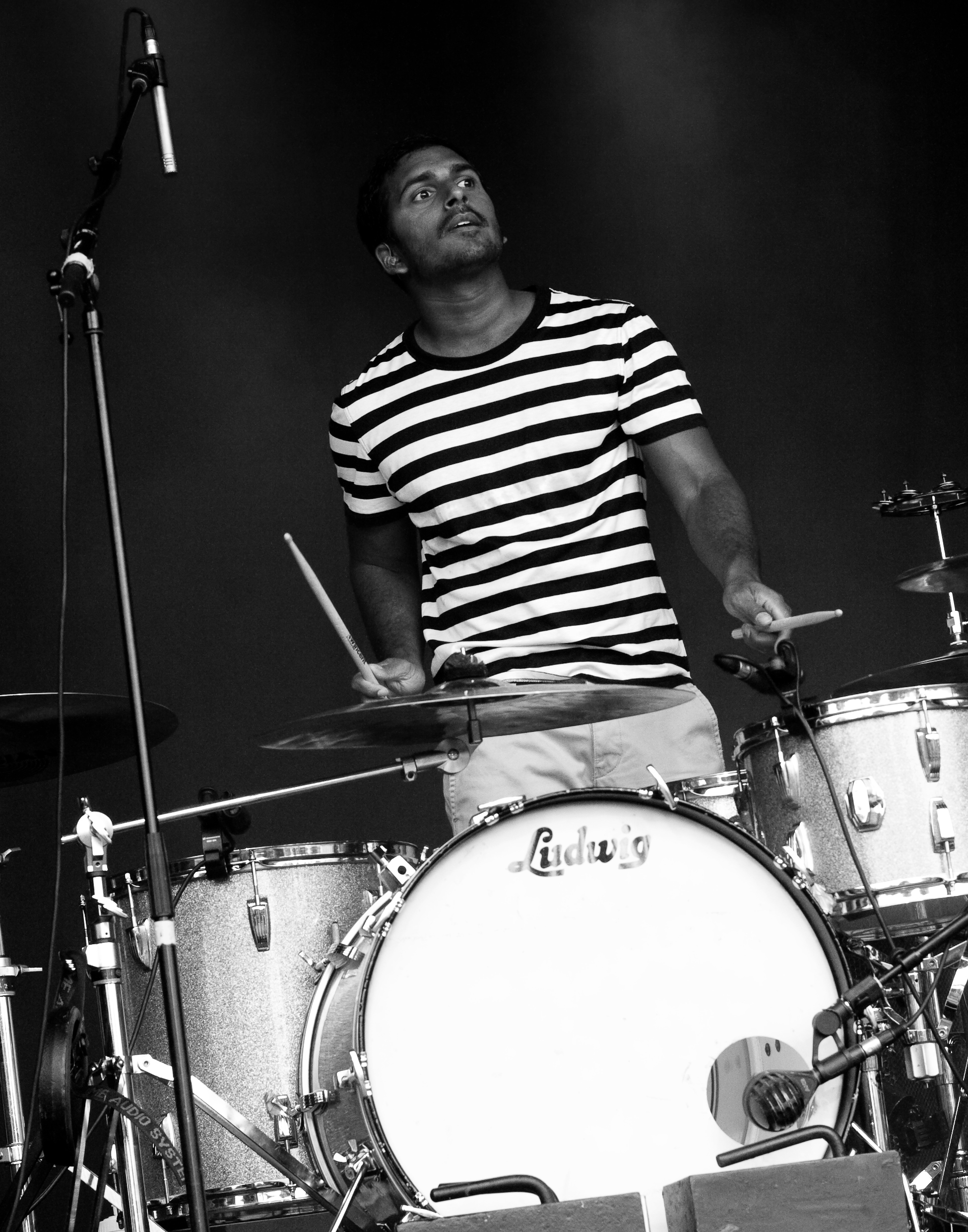 Thomas Hedlund, drummer in Deportees